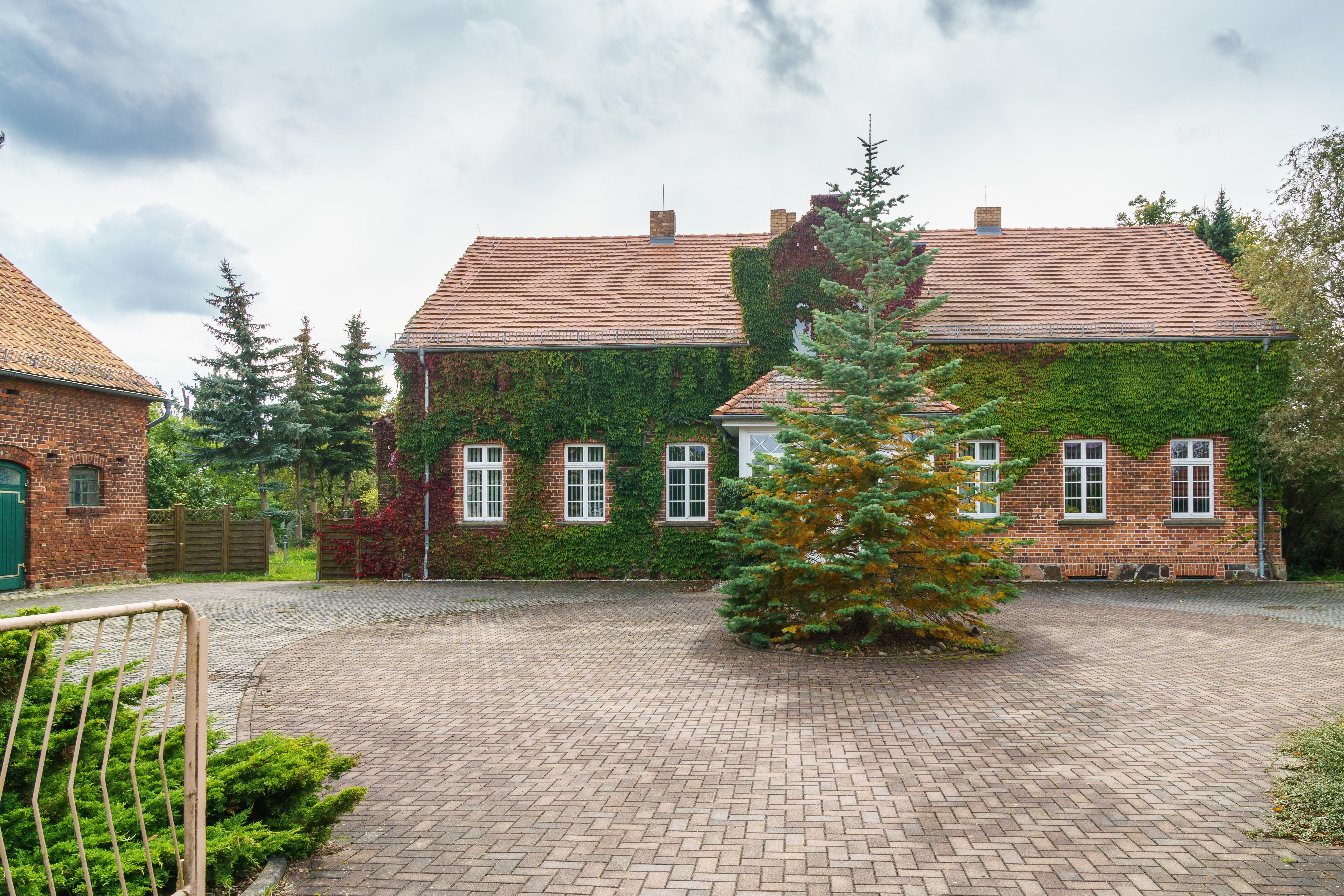 Oberförsterei, Dorfstraße 17, Ahornweg 4, 6 in Hohenbucko